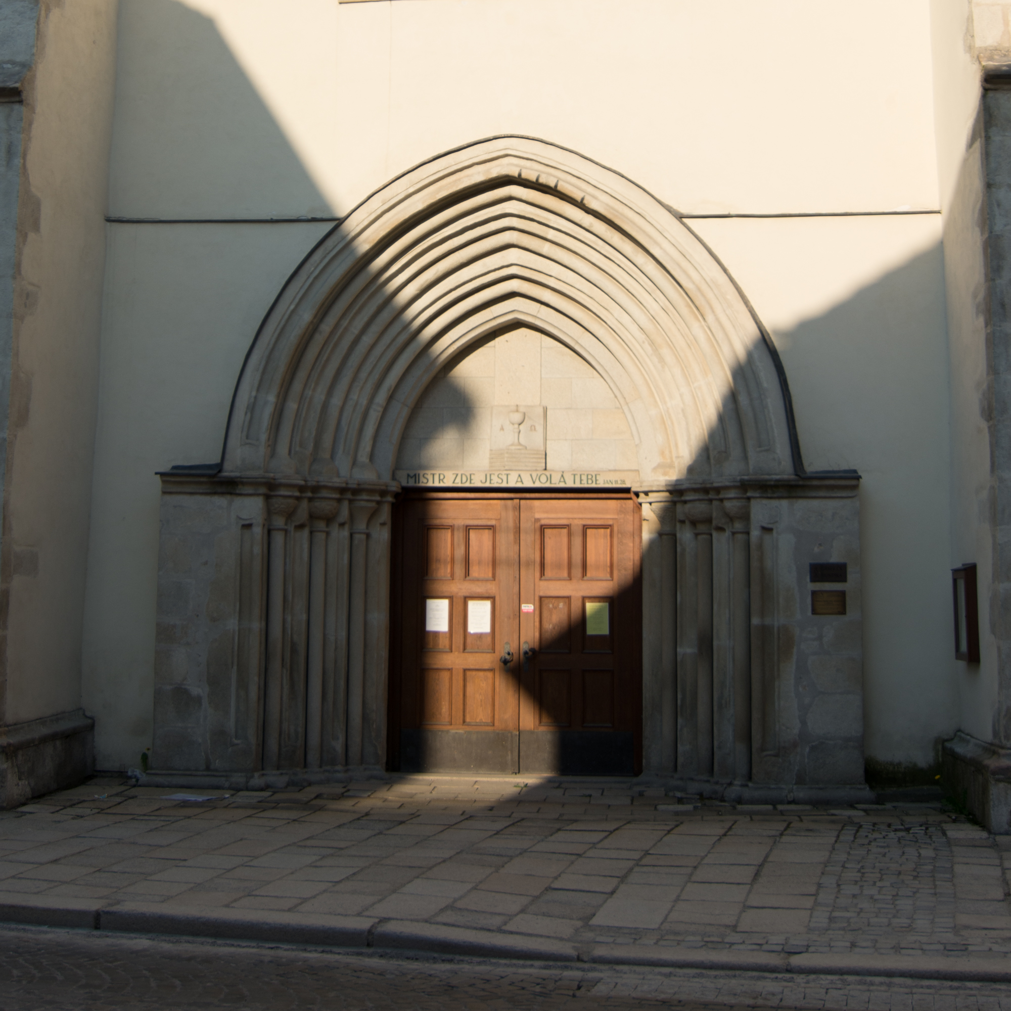 vstupní ústupkový portál